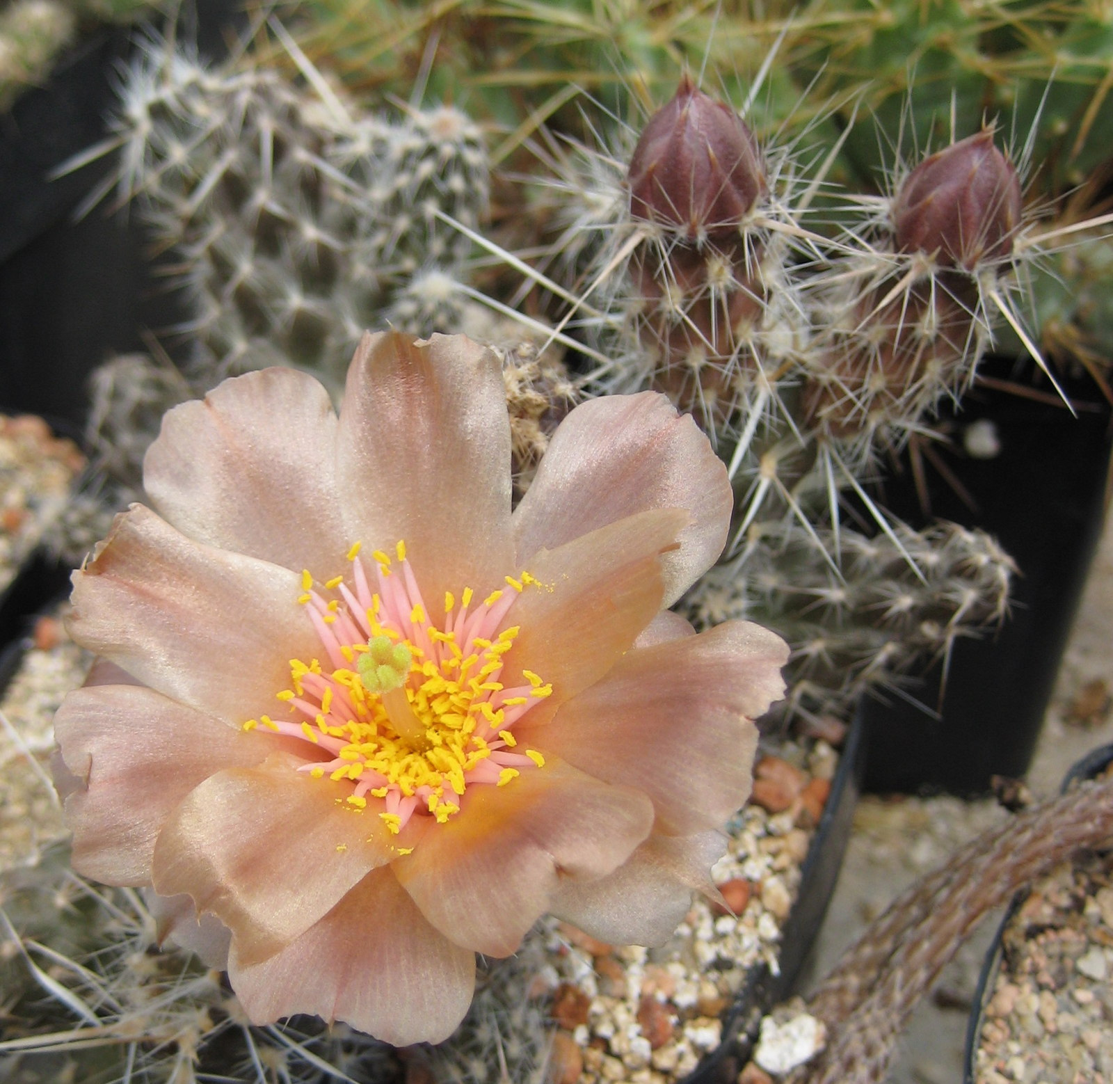 Pterocactus fischeri in Kultur